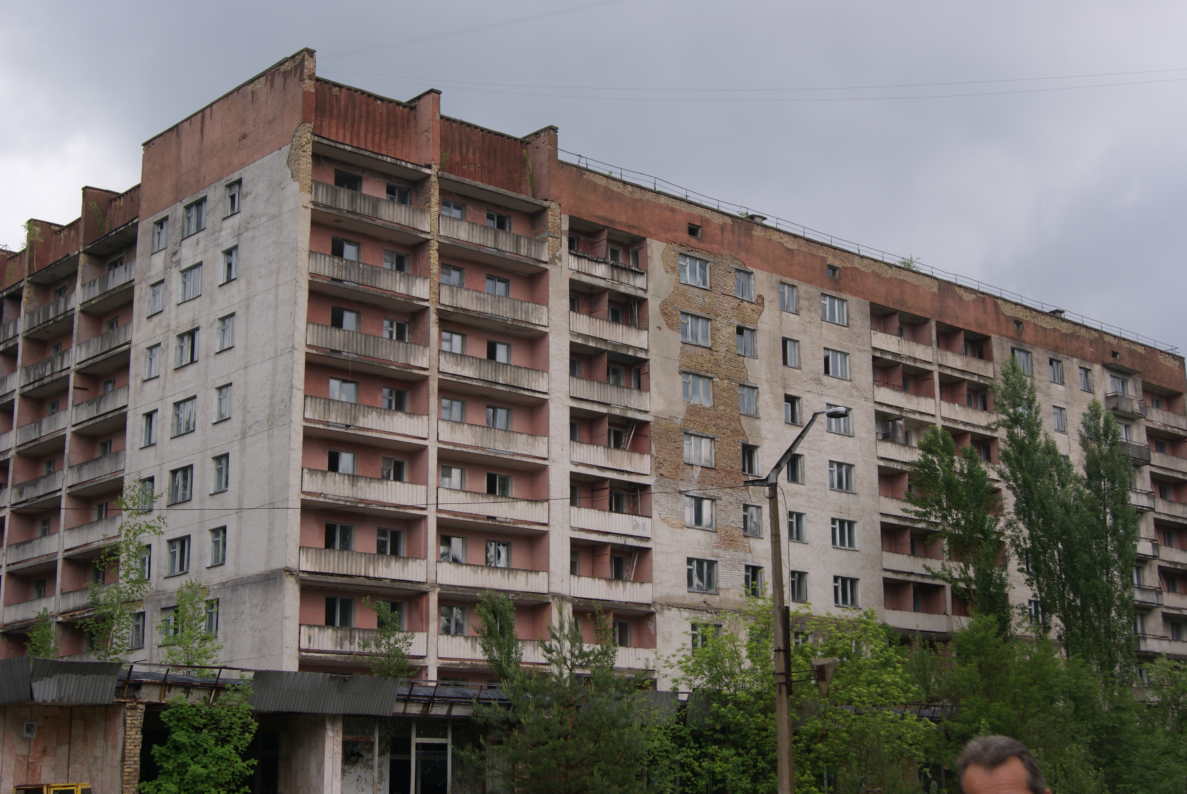 Будинок на головній прощі